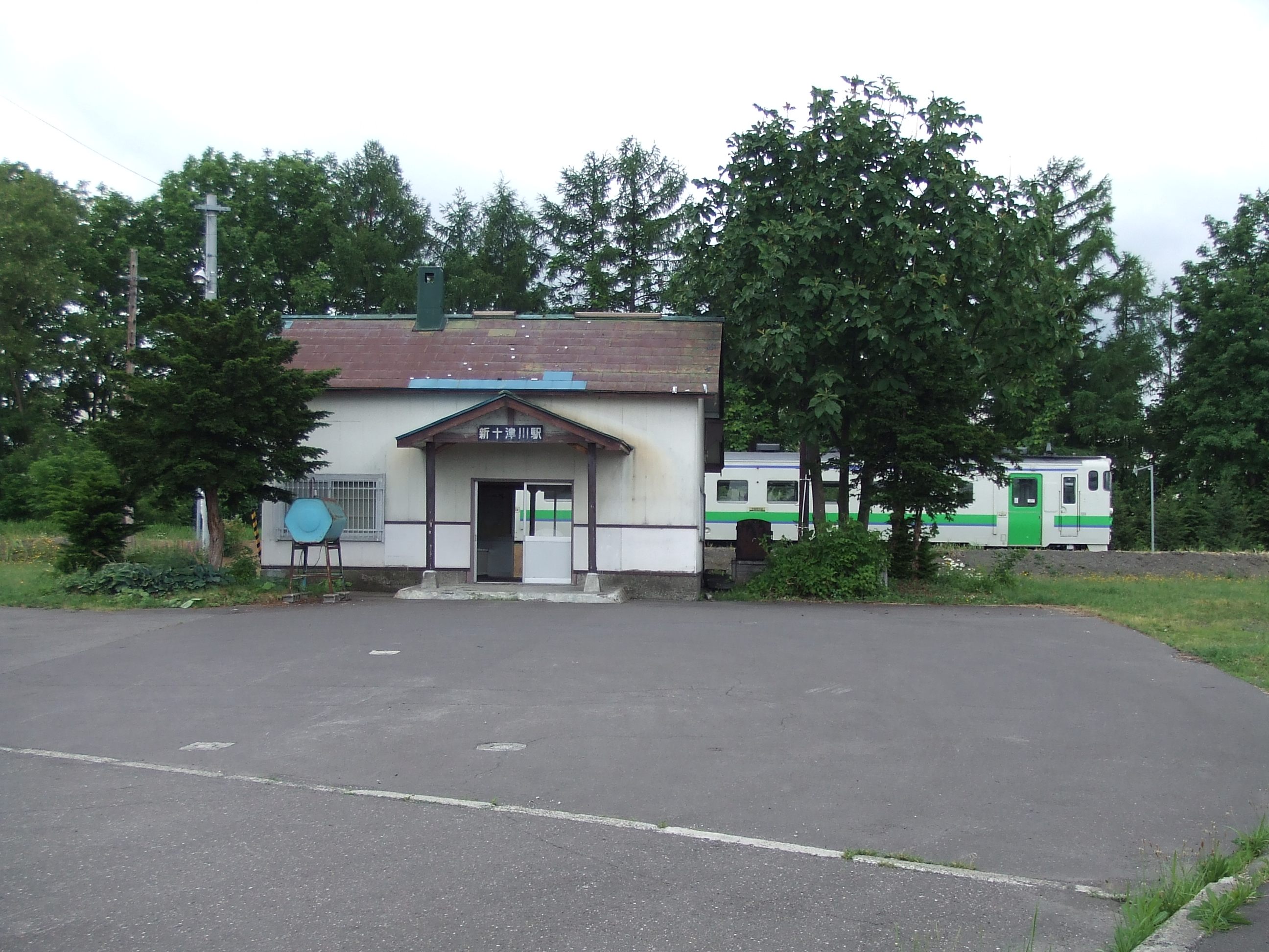 新十津川駅 駅舎と駅前広場